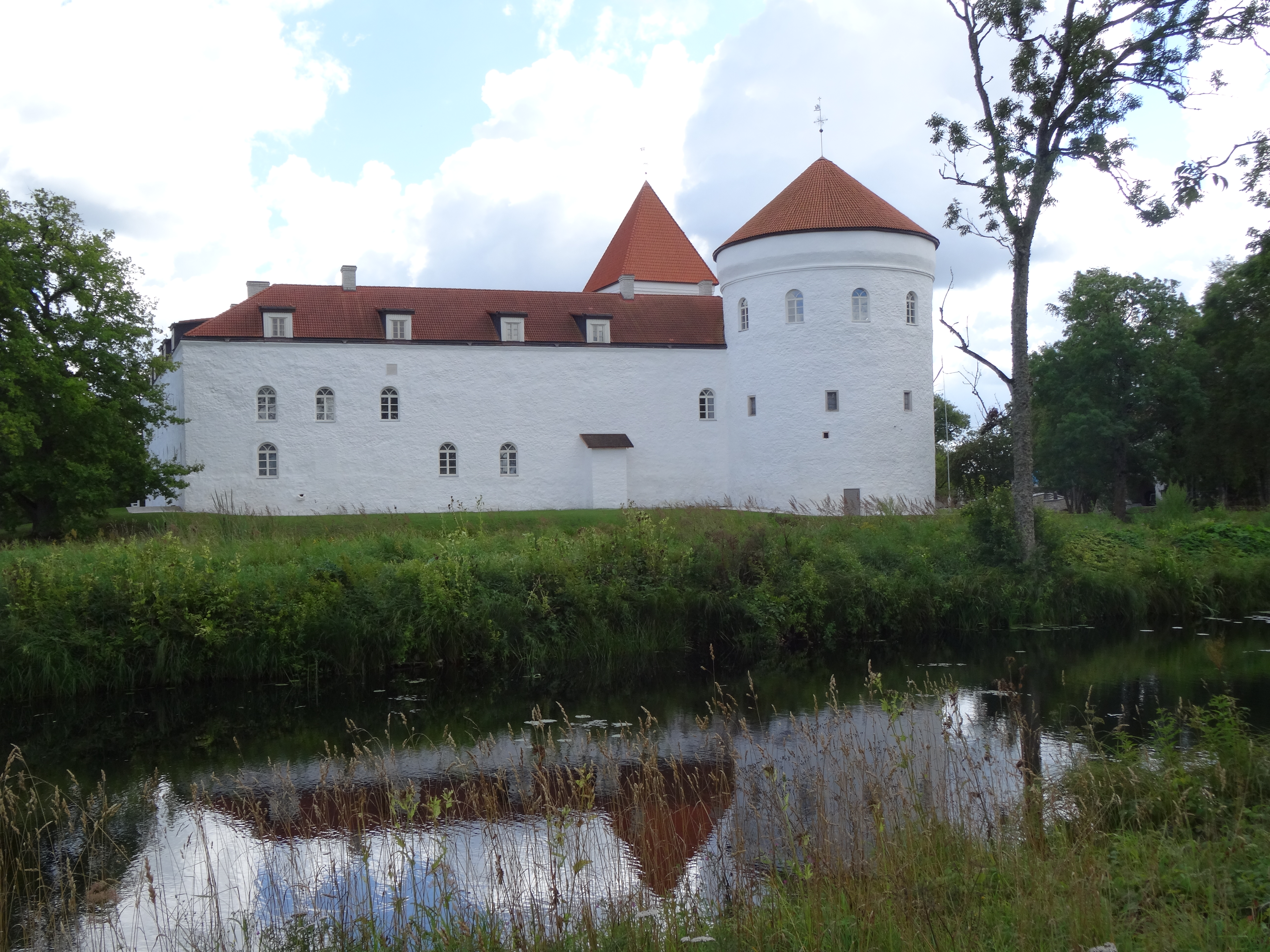 Koluvere linnus (September 2015, kõrvalt)